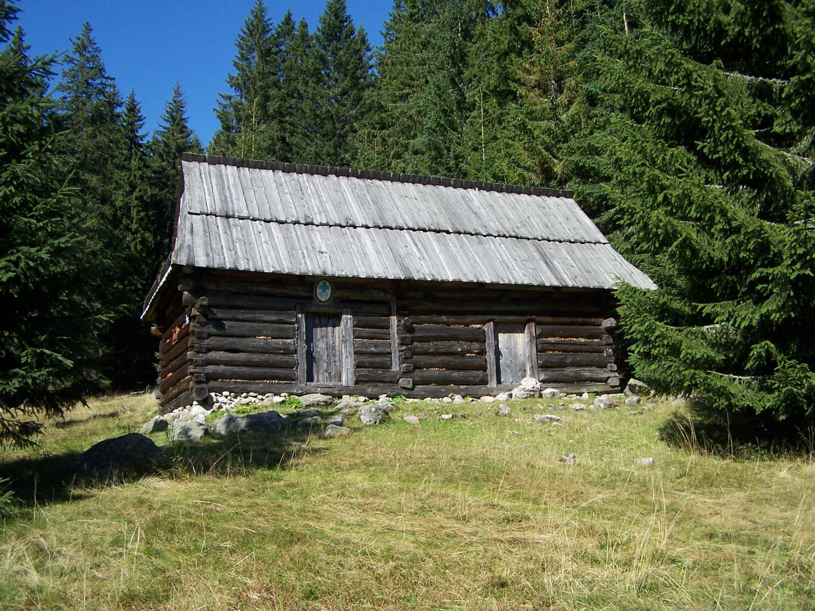 polana Chochołowska, stróżówka GOPR